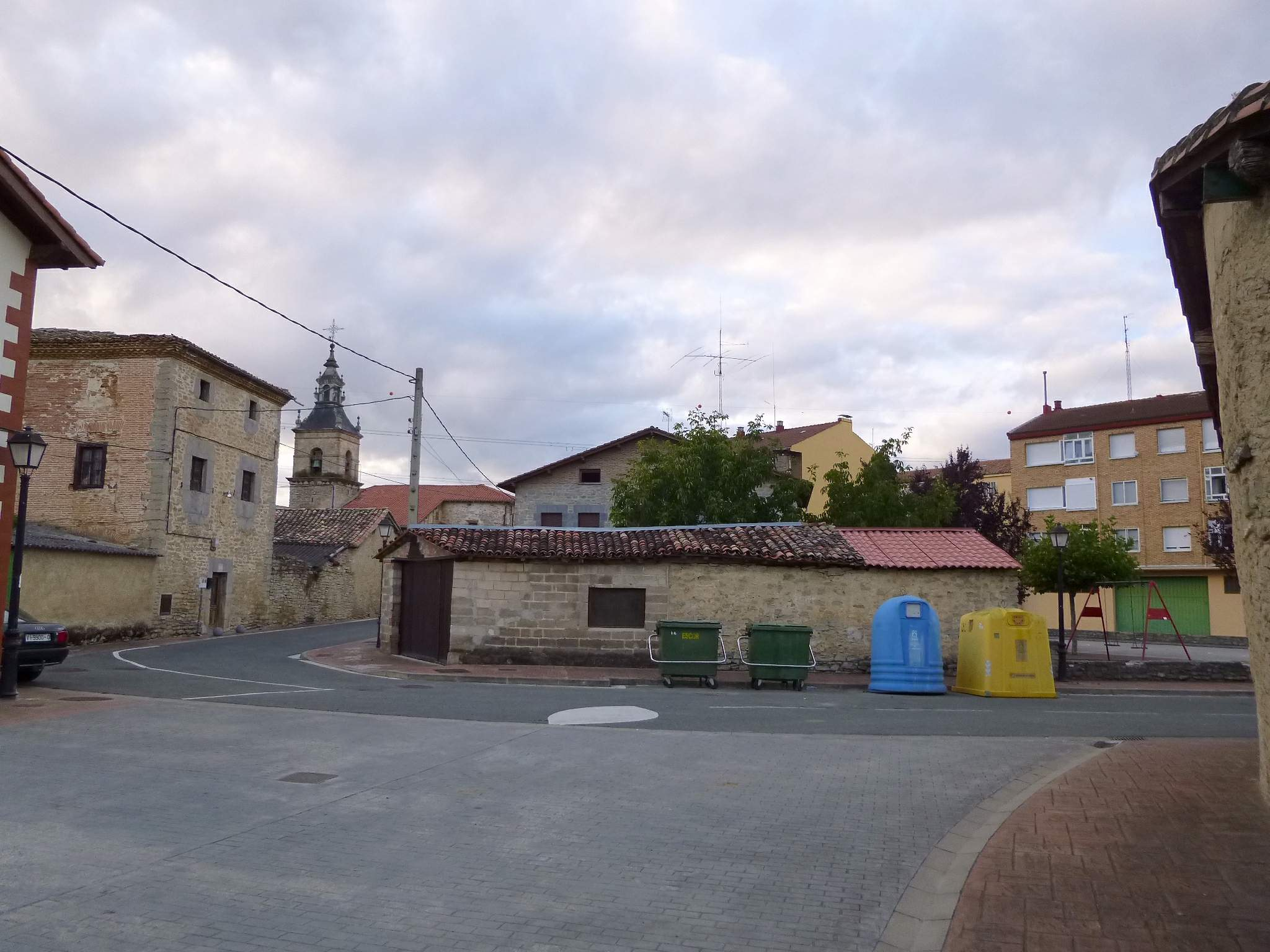 Astegieta (Vitoria, Álava)